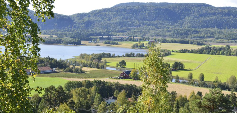 Sandeelvas utløp er nerven i et vakkert natur- og kulturlandskap.